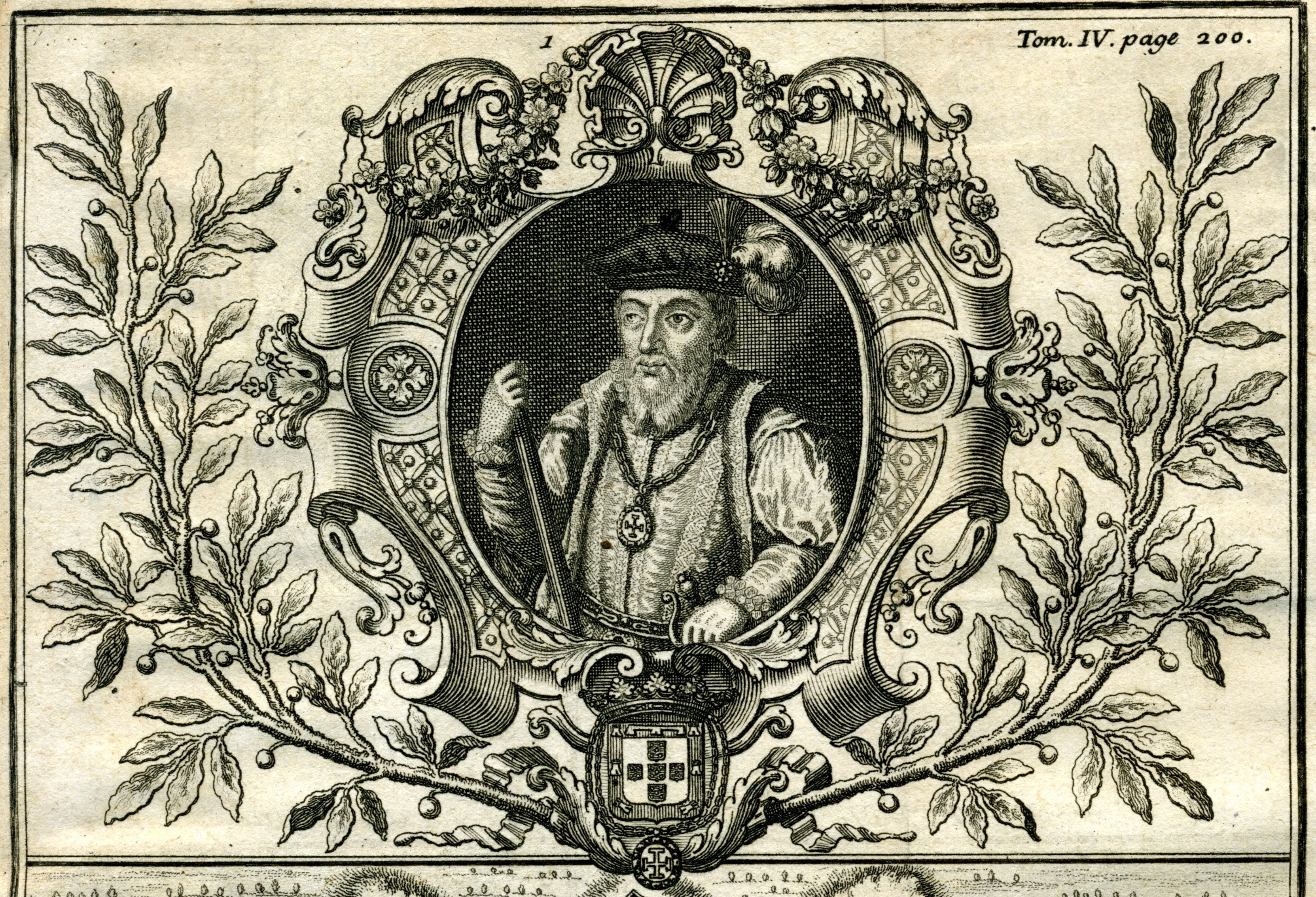 Constantino_de_Bragança. In Lafiteau : Histoire_des_découvertes_et_conquestes_des_portugais_dans_le_nouveau_monde._Tome_IV._Paris_Amsterdam._Wetstein,_&_G._Smith._1736